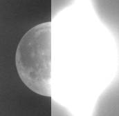 Jordskin - Månen set igennem et halvt filter